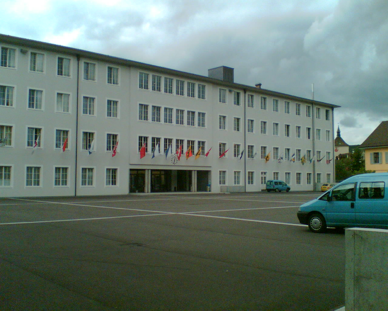 Fotografia della caserma di Liestal (BL), Switzerland.